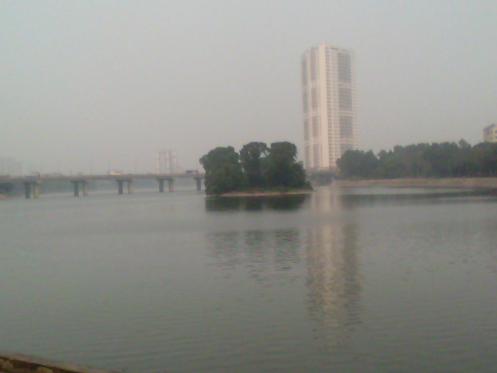 Quang cảnh hồ Linh Đàm với đảo Cò ở trung tâm